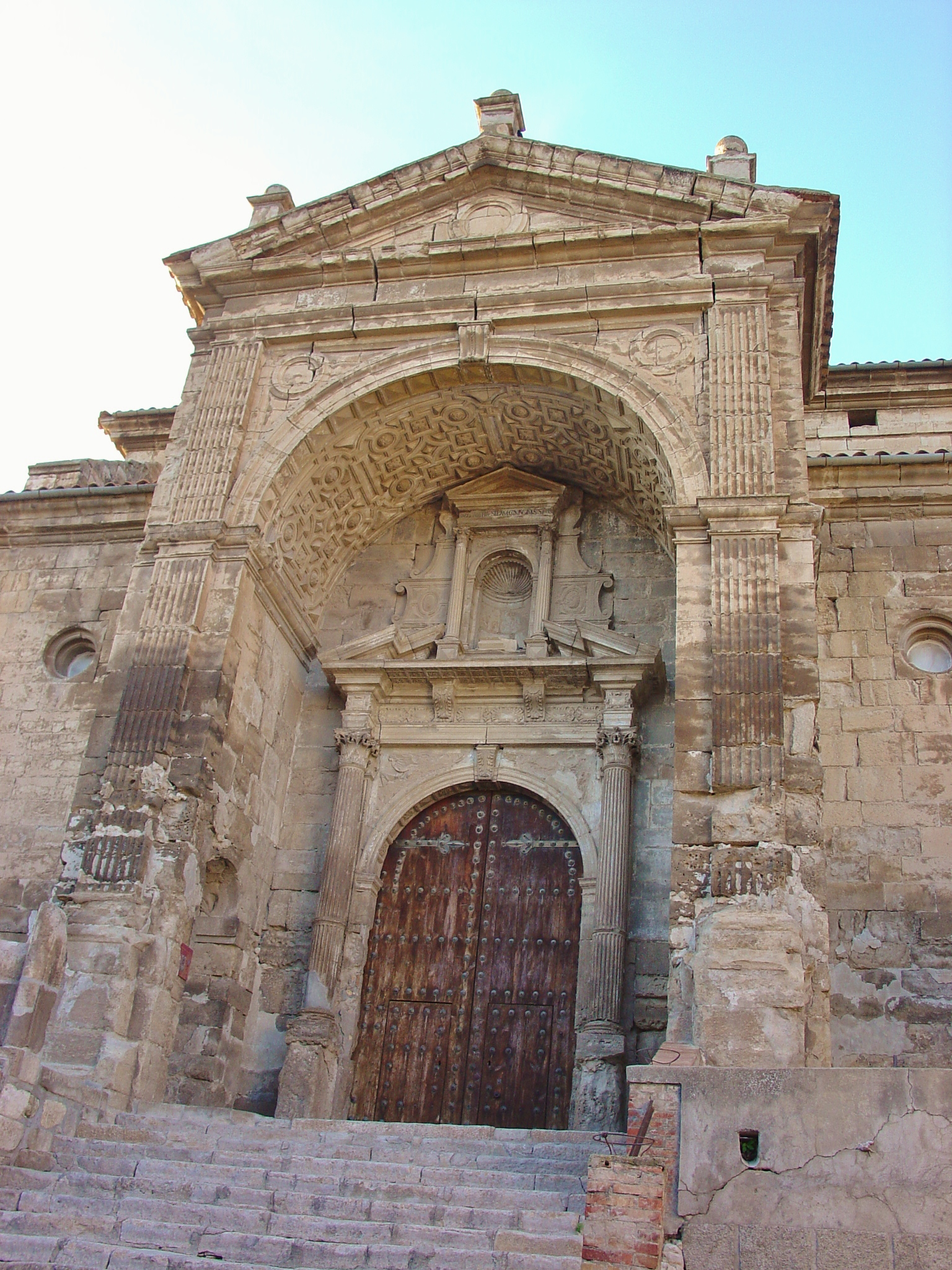 Puerta de la iglesia de Fonz (Huesca, España)